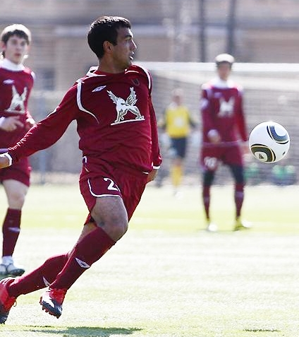 Баходир Насимов (ФК "Рубин")